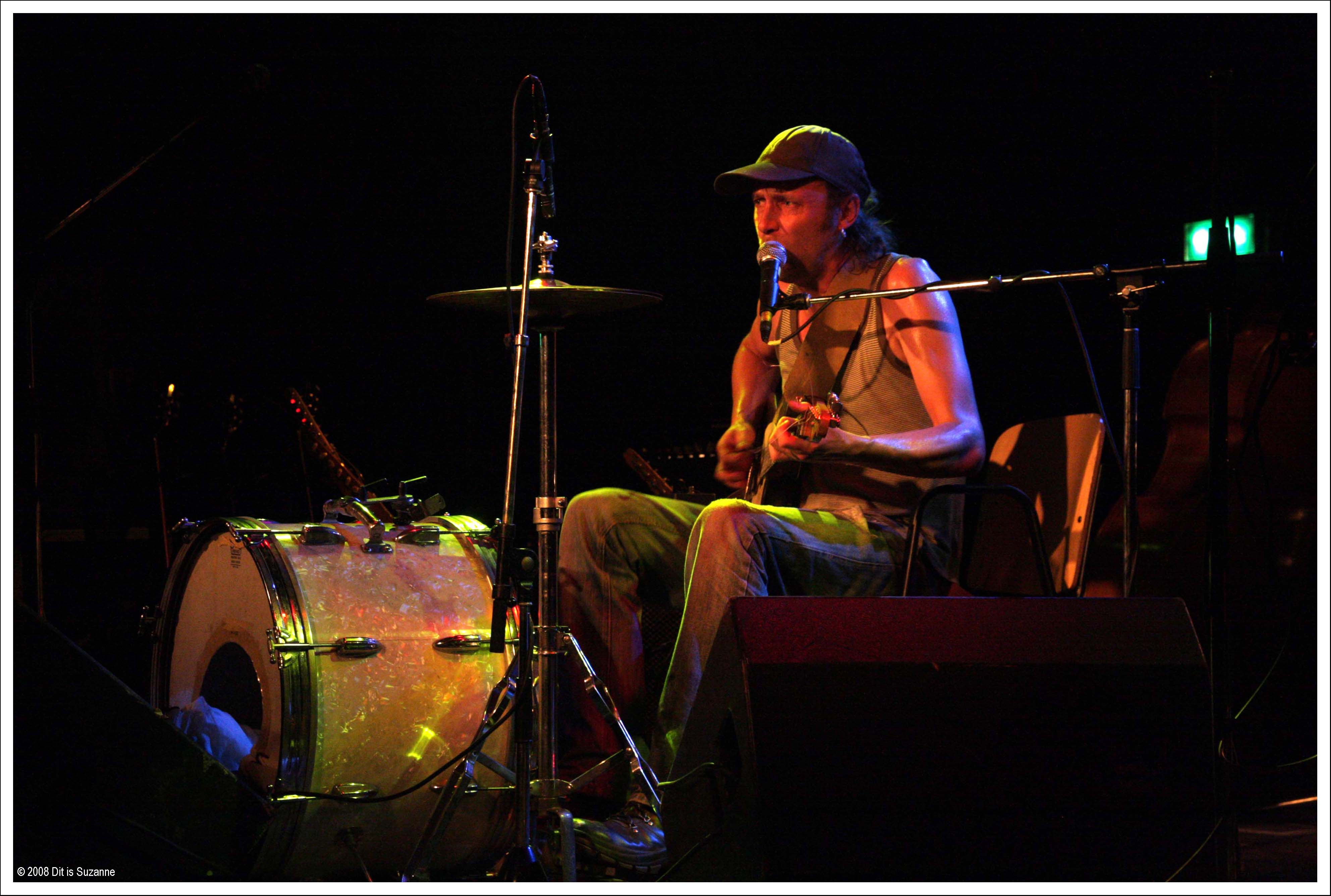 Groningen | Гронинген, 02-07-2008.Groningen, Vera (Oosterstraat), 02-07-2008. Voorprogramma van André Manuel&de Ketterse Fanfare.Groningen, Club Vera (Oosterstraat), 02-07-2008. The opening act for André Manuel&de Ketterse Fanfare.Ottoboy The One Man Trash Band on